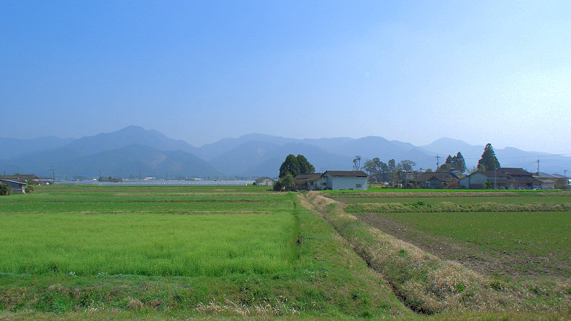 くま川鉄道湯前線ja:新鶴羽駅 駅周辺 ホーム上から南側を見る。 撮影者/著者/著作権保有者 : MK Products (本人がアップロード) 撮影日 : 2007/03/30 新鶴羽駅用にアップロードした画像です。良い画像があれば別の画像に変えてください。 Category:鉄道駅前画像 Category:多良木町の画像